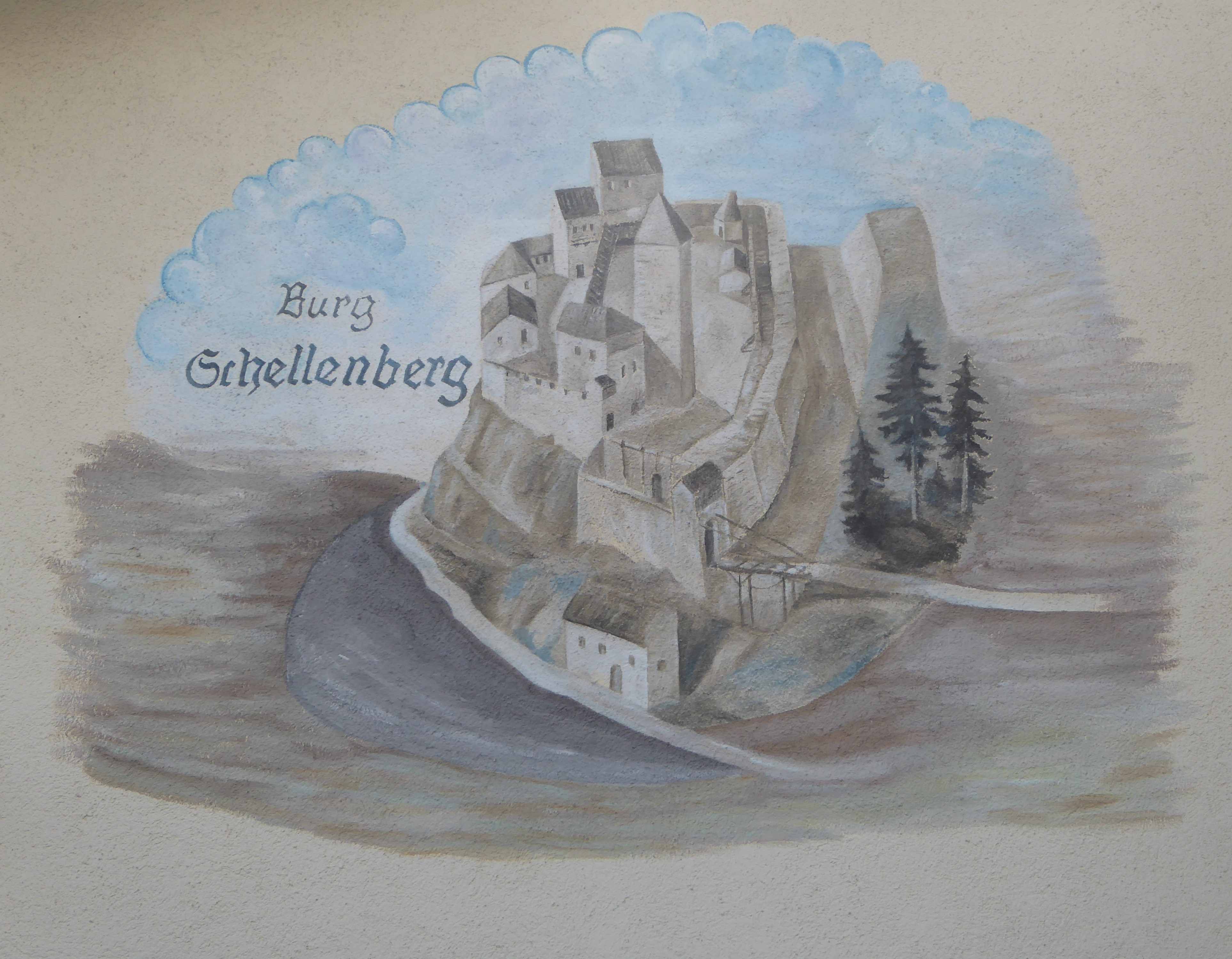 Gemälde der Burg Ober-Schellenberg an der Fassade eines Einfamilienhauses am Schlossweg in Schellenberg, Liechtenstein